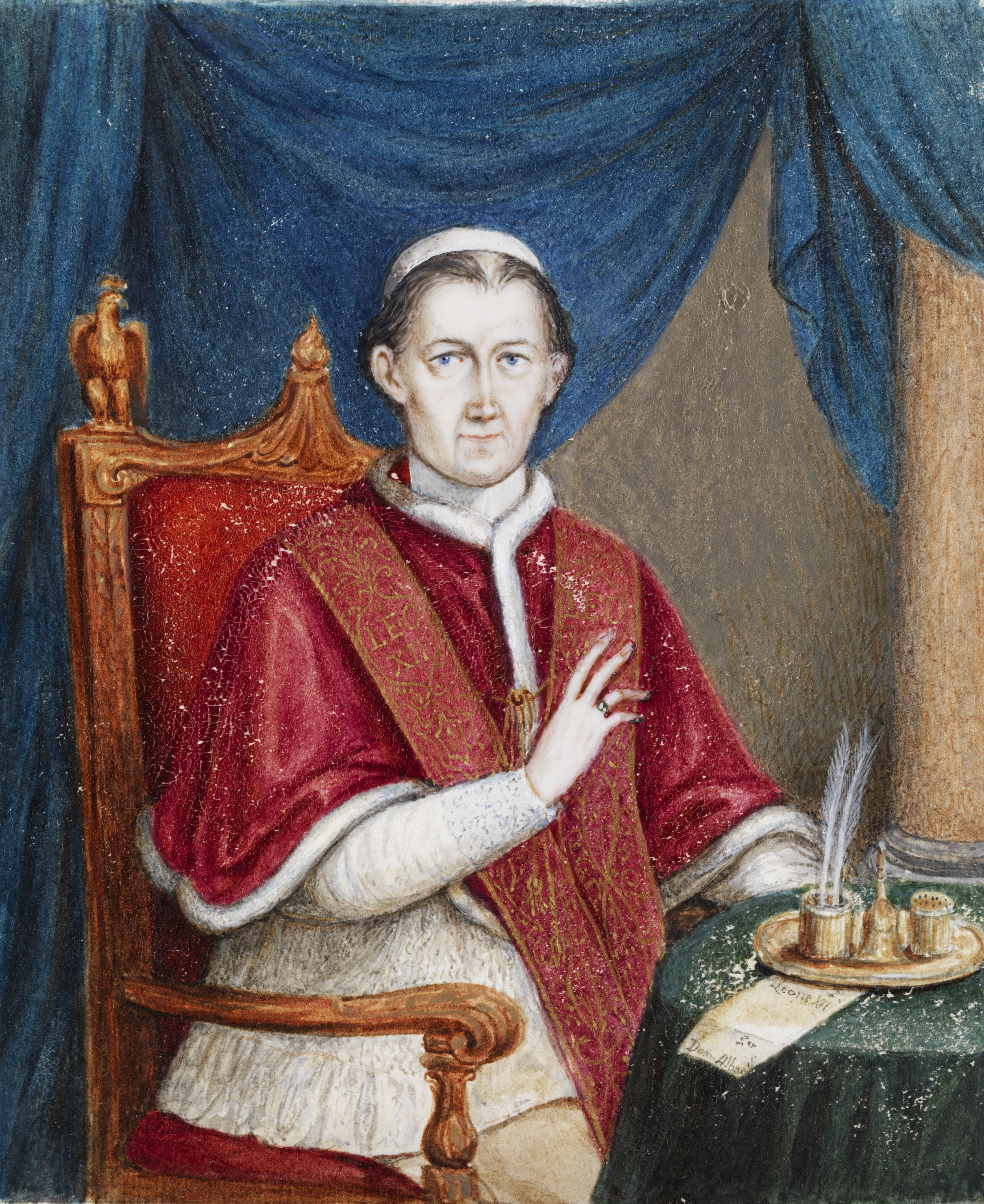 Anonym, italienisch, 19. Jh.: Portrait Papst Leo XII., Öl/ Gouache auf Karton, 13,5 x 11 cm